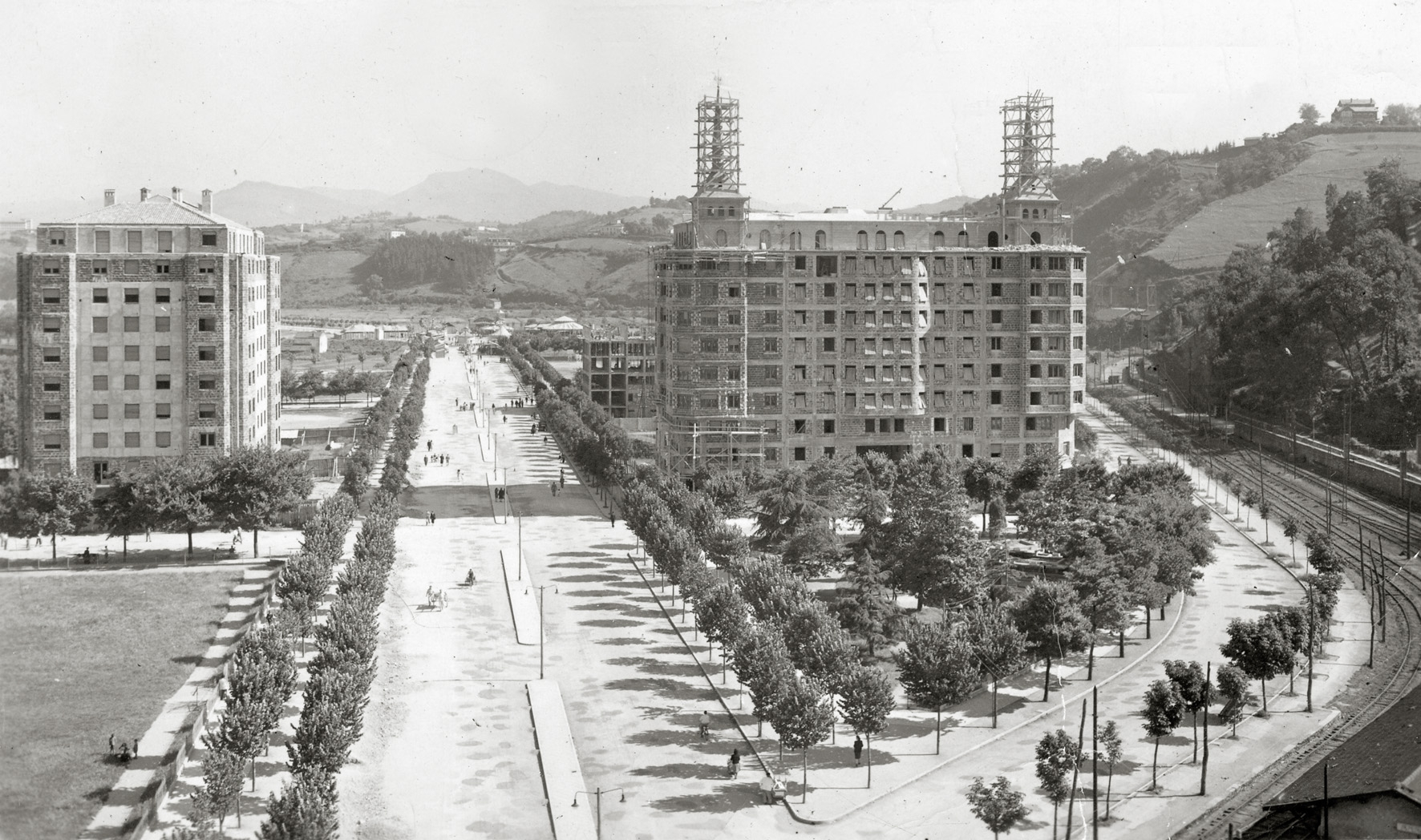 Antso jakituna pasealekua Amaran. 1947.